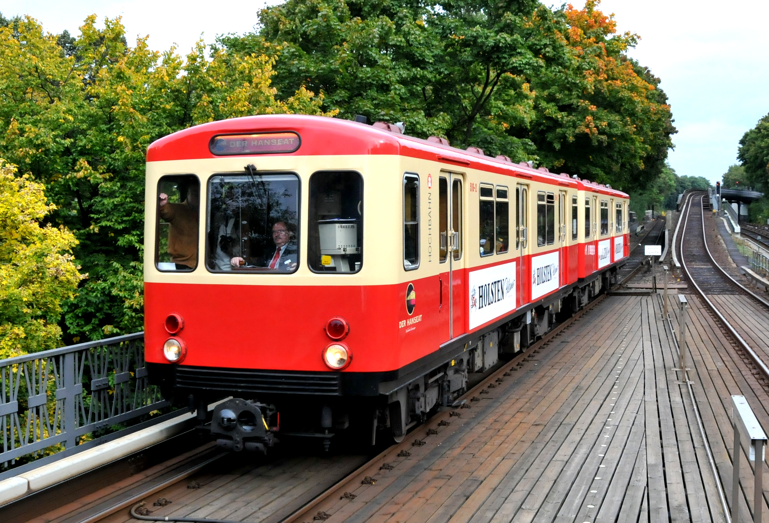 Hamburger Hochbahn treinstel van het type DT1 tijdens parade te Eppendorfer Baum.